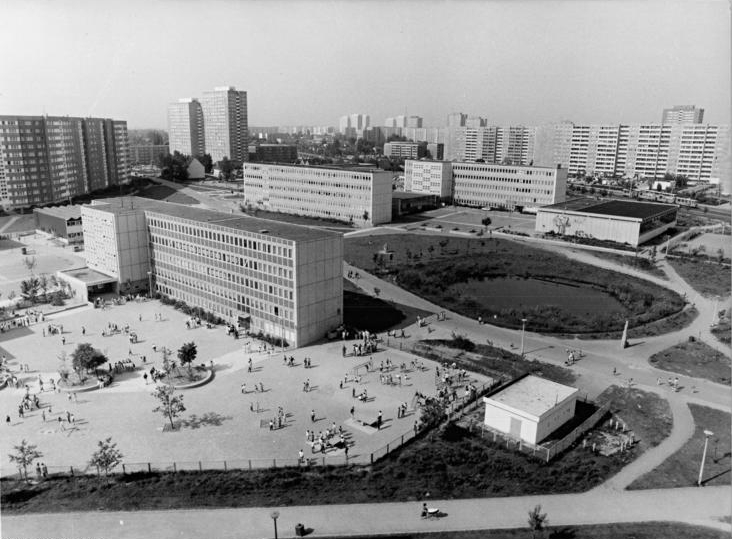 Berlin, Marzahn, Neubaugebiet, Wohnblocks ADN-ZB Schindler 25.6.87-cc-Berlin: Neubaugebiet Marzahn-Zehn Jahre ist es her, daß im Marzahner Neubaugebiet die erste Platte gesetzt wurde. Wie zwischen Otto-Buchwitz-Straße und Allee der Kosmonauten entstanden bisher über 60.000 Wohnungen, zahlreiche Schulen, Turnhallen, Klubgaststätten, Kaufhallen und weitere Einrichtungen. Rund 160.000 Bürger wohnen in diesem jungen Stadtbezirk. 1987 werden in Marzahn über 5.500 Wohnungen gebaut, die meisten davon im Gebiet Ahrensfelde-Süd. Information added by Wikimedia users. Drei typische Schulgebäude, in der Mitte die 19. POS "Pham Tuan". Der Teich am rechten Bildrand ist von Schülern gereinigt und wiederhergestellt worden und wurde später unter Naturschutz gestellt. Das Bild ist in Richtung SW aufgenommen. Das markante Doppelhochhaus gehört zur Kienbergstraße.